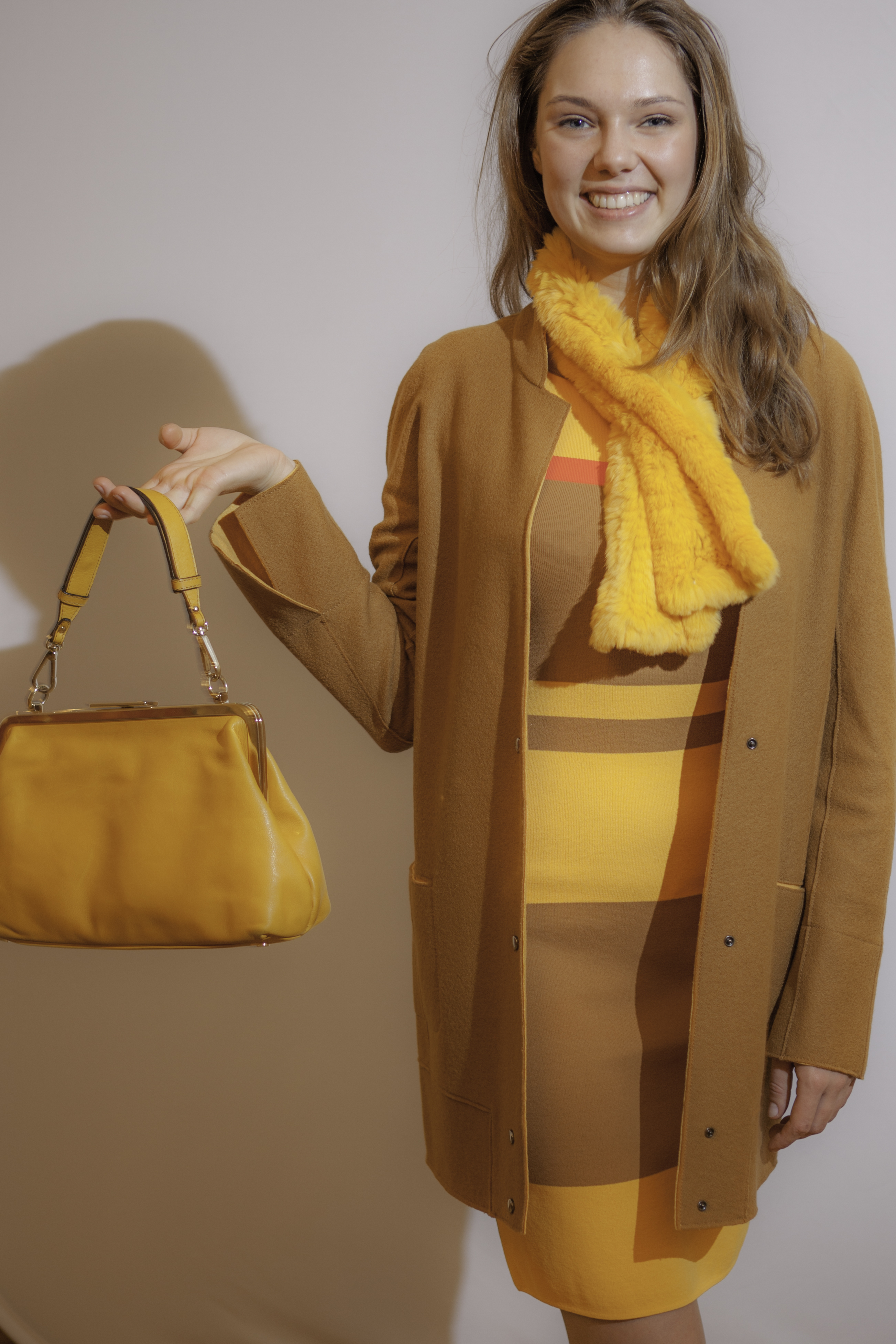 Yuliya